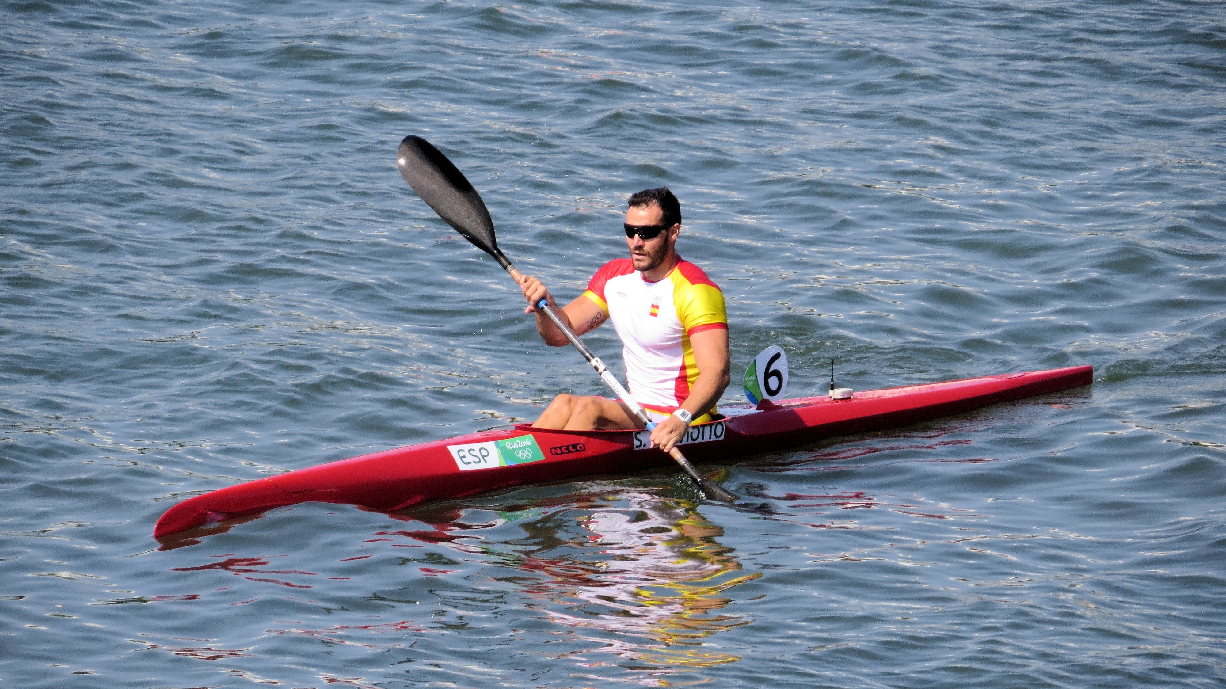 Sx50